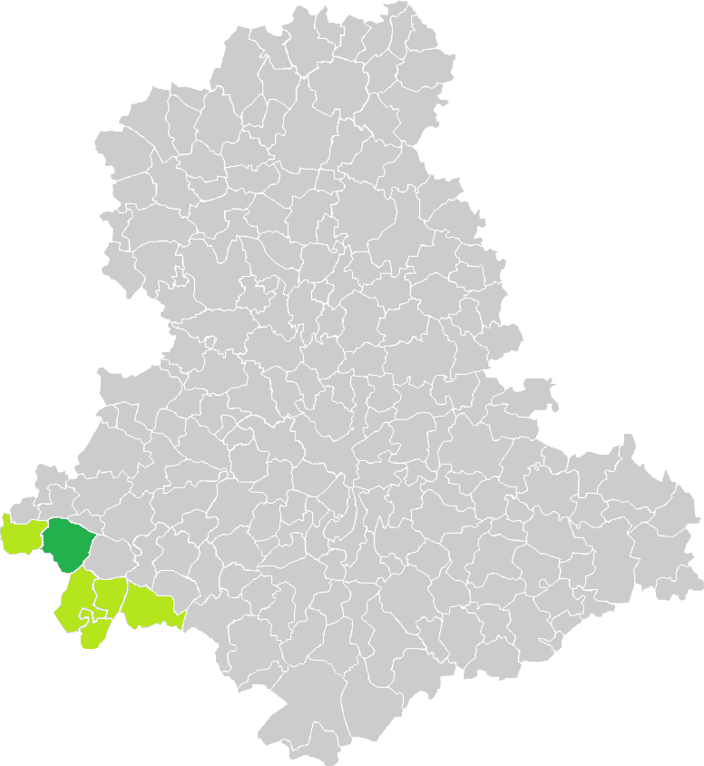 Carte de situation de la commune de Saint-Mathieu (en vert foncé) dans le votre Canton (en vert clair) sur une carte des communes de la Haute-Vienne